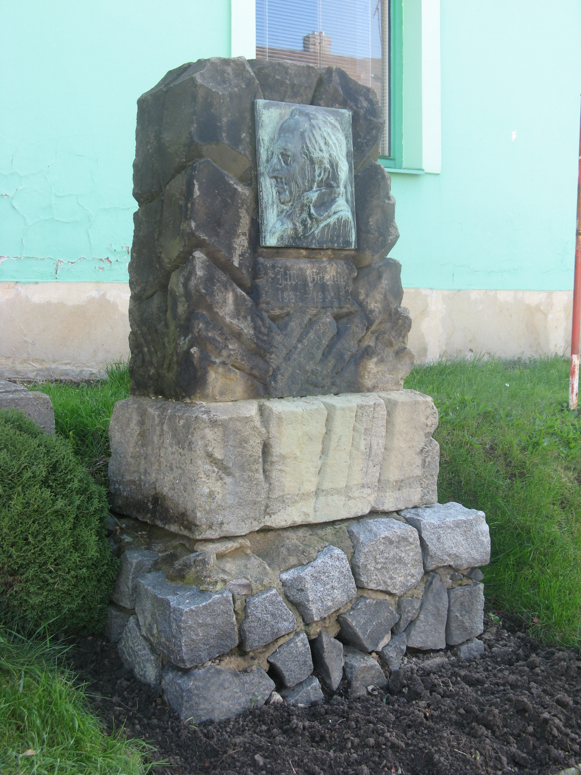 Pomník J. W. Geotha, Svitavy, Brněnská ulice (Čtyřicet Lánů 30).JPG